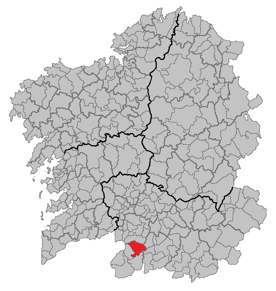 Mapa coa localización do concello de Bande.